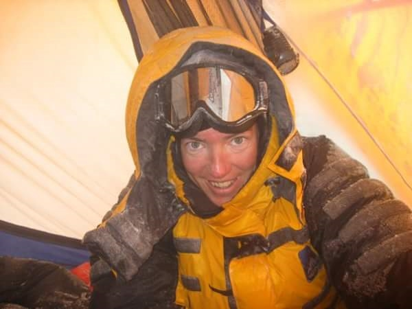 Cristina Piolini fotografata sul Monte Vinson, Antartide, nel 2009